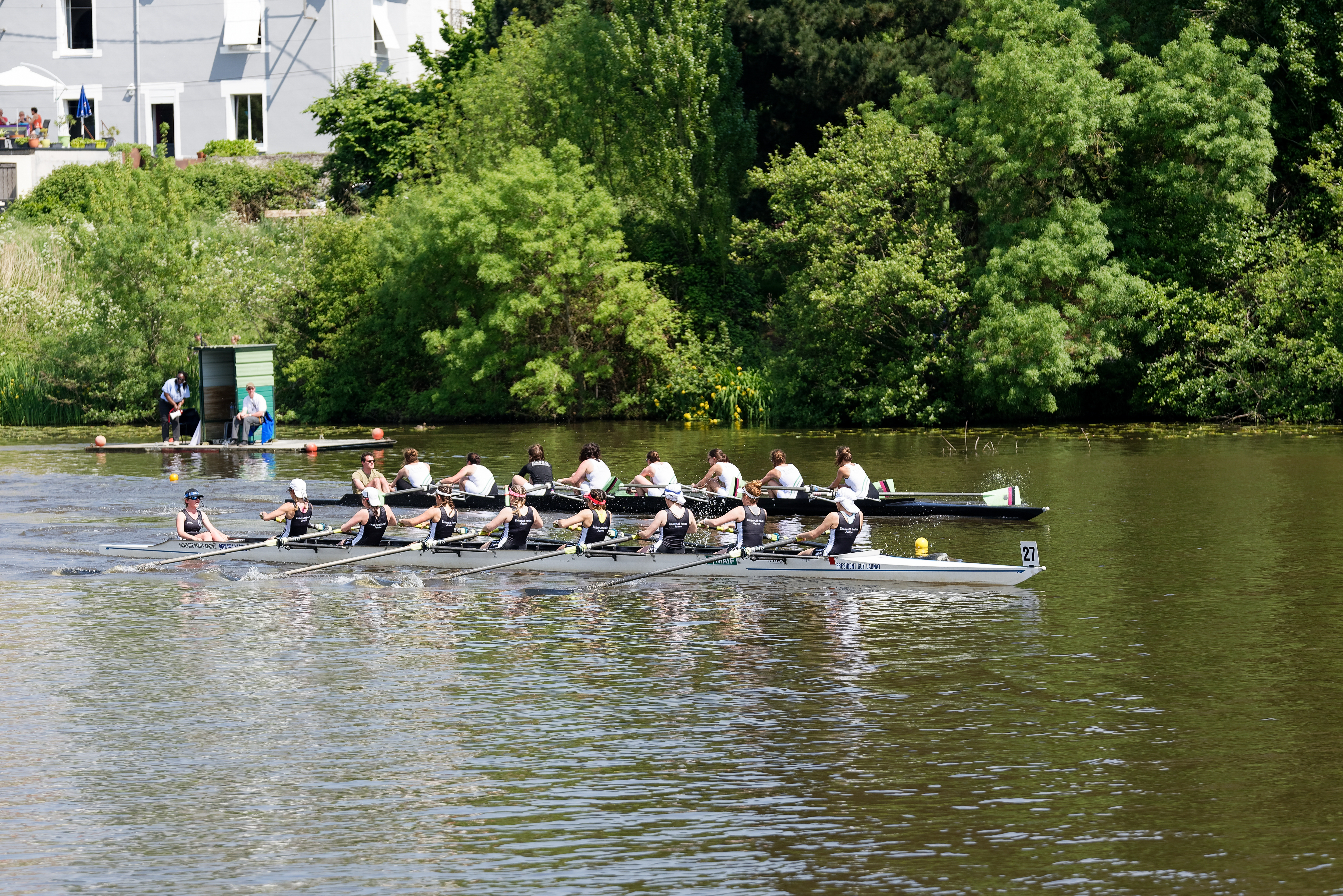 Régataïades Internationales de Nantes 500 mètres. Compétition d’aviron universitaire français organisée par le club Université Nantes Aviron (UNA).